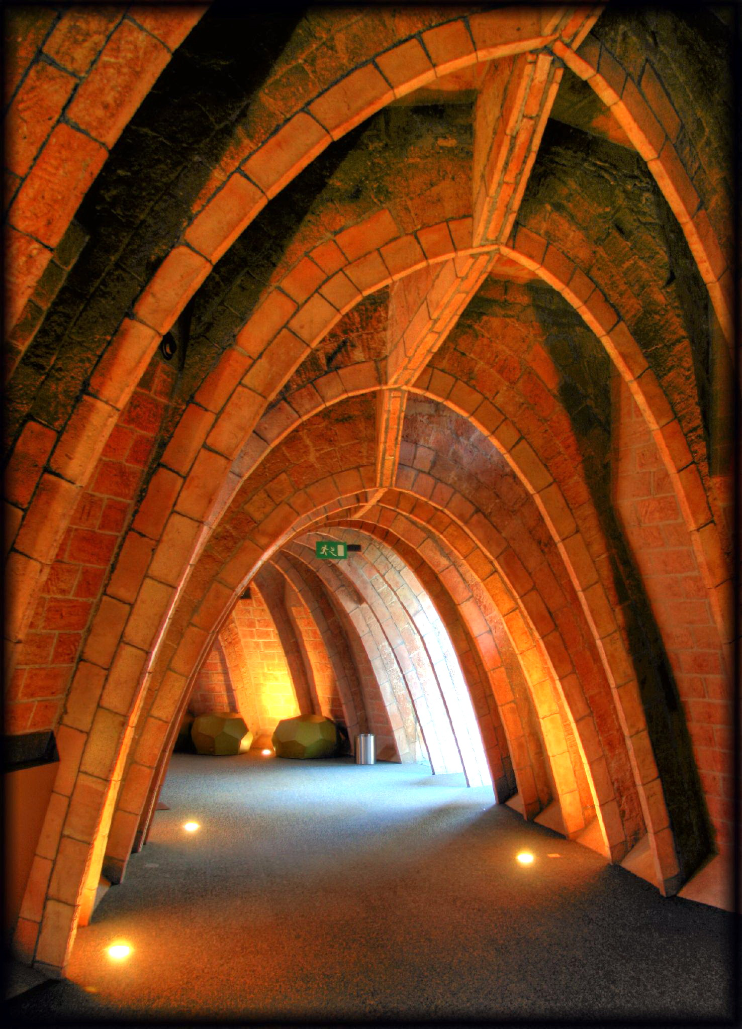 Voûtes avec arcs-doubleaux, Casa Milá, Barcelone, Espagne.